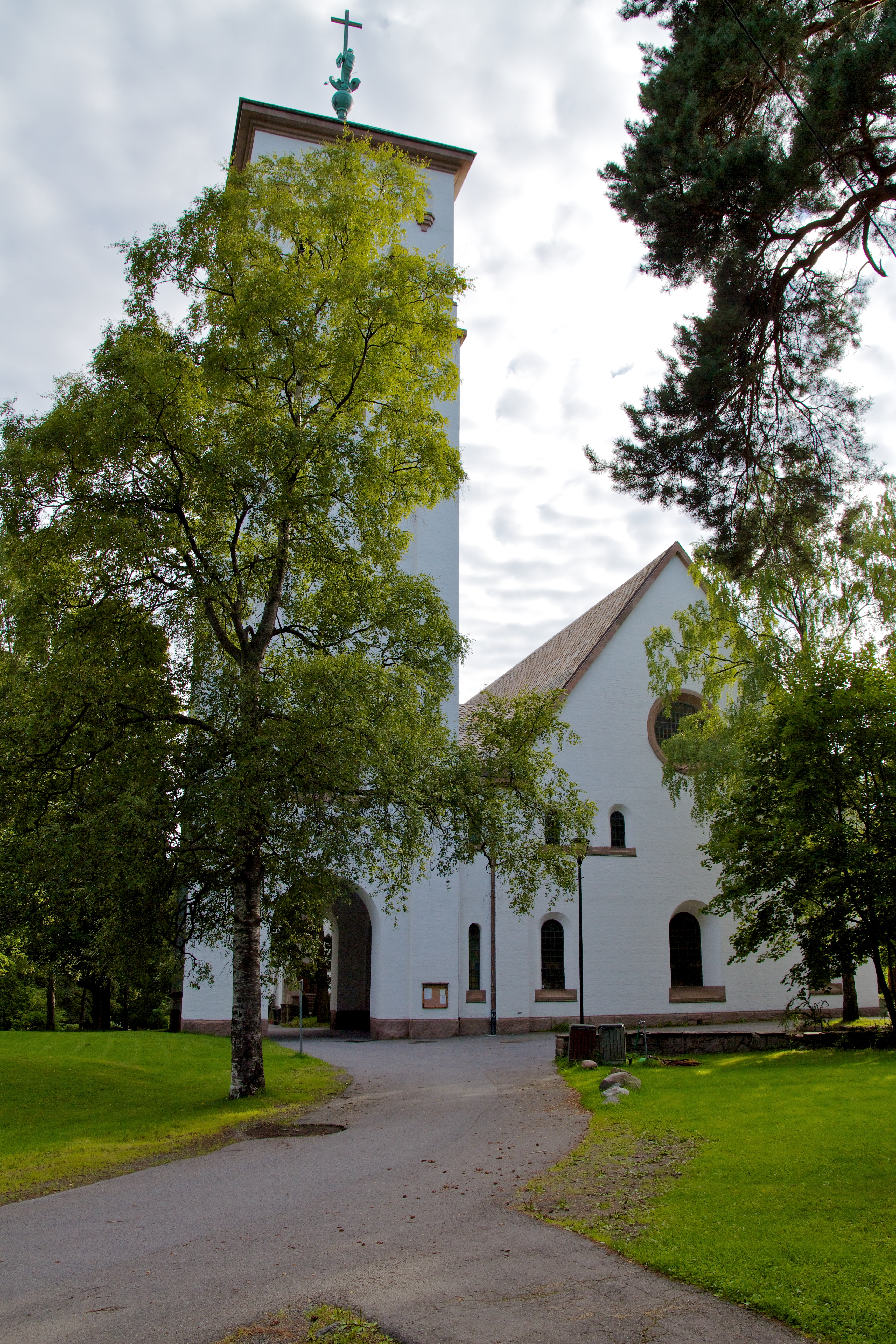 Ris kirke i Oslo.